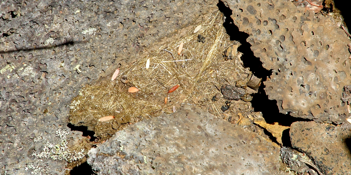 Иллюстрация для викиучебника Гавайеведение